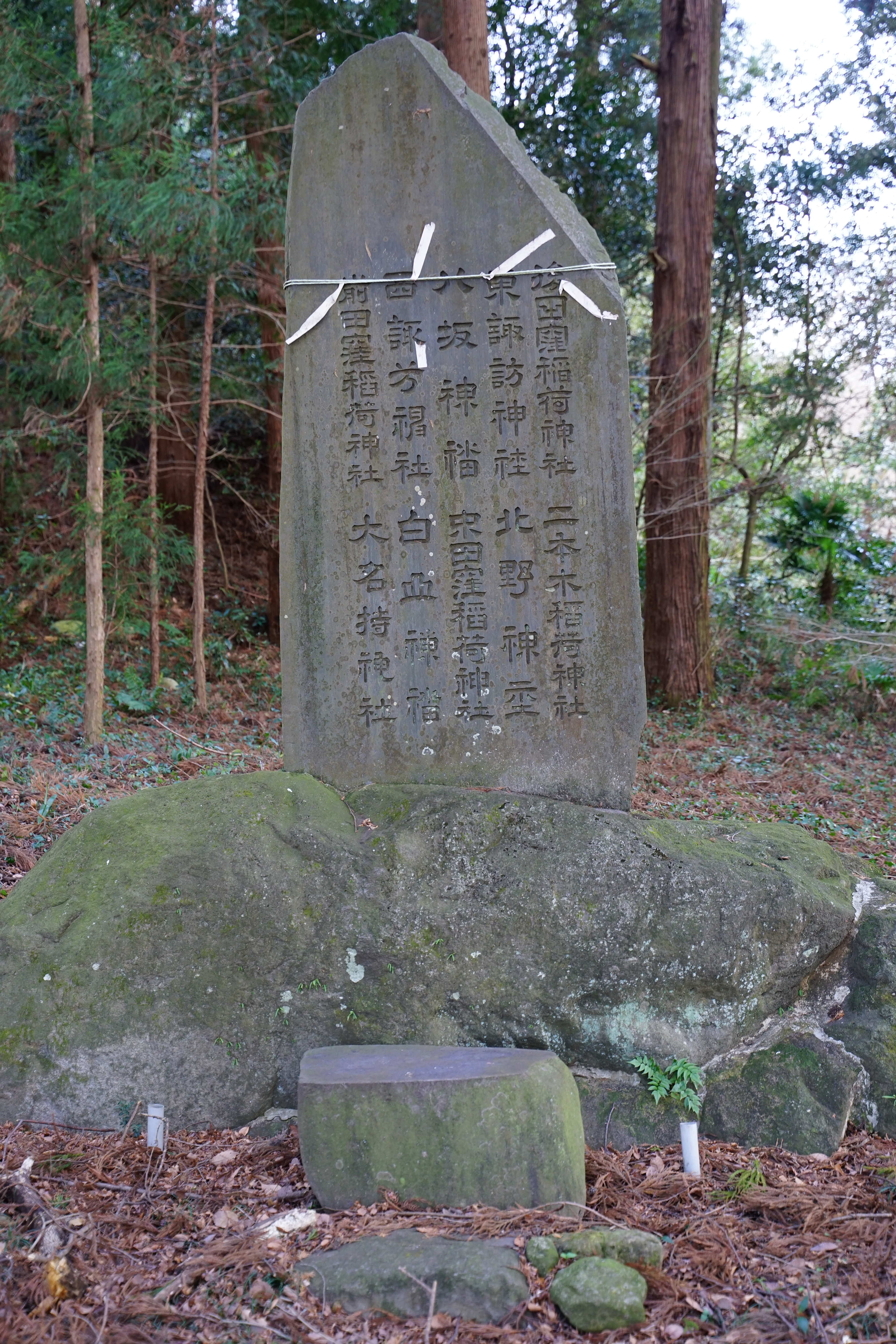 甲波宿禰神社（渋川市行幸田）の合祀碑